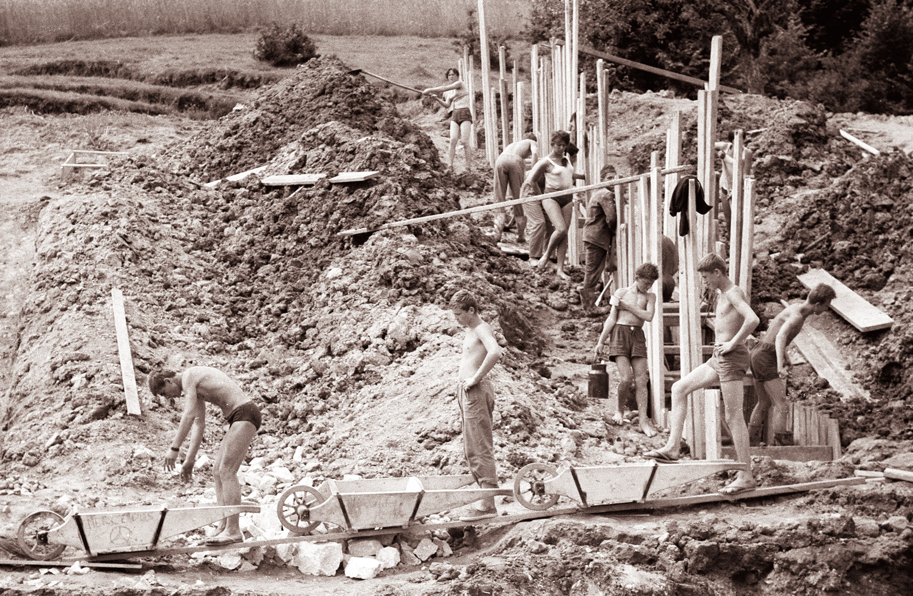 Mladinska delovna brigada z Jesenic pri gradnji športnega stadiona v Ravnah na Koroškem.